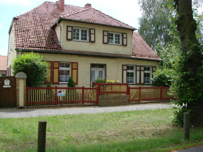 Haus gehörte zum Lehnschulzengut des Dorfes, das 1850 verkauft wurde.